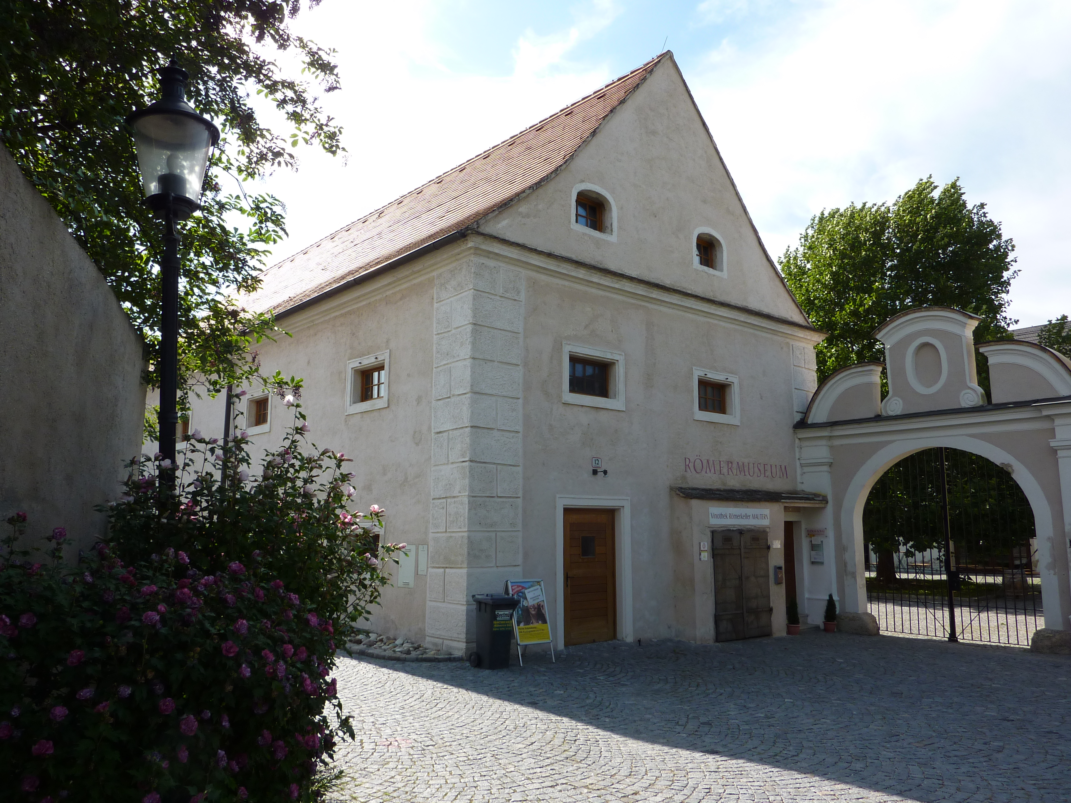 Römermuseum, ehem. Schüttkasten, Schloßgasse 12, Mautern an der Donau, Niederösterreich